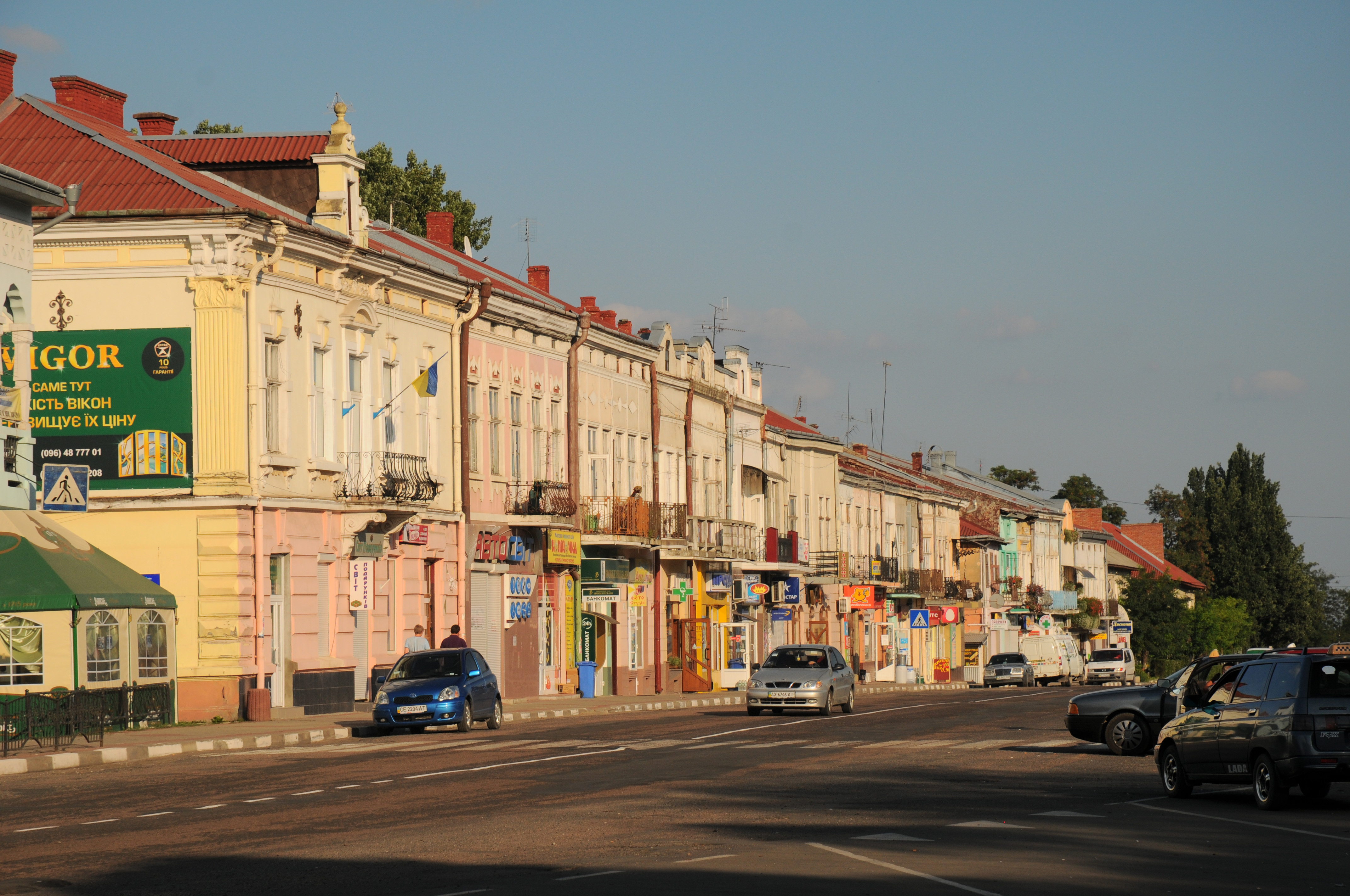 Снятин, вул. Шевченка, буд.№№ 143, 145, 147